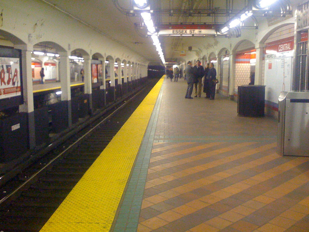 Central (AKA Central Square) MBTA station.